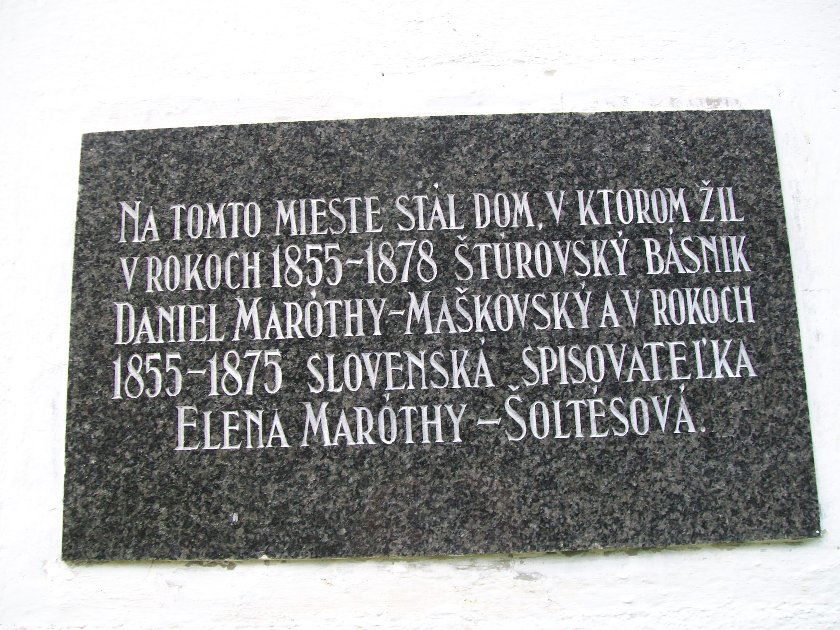 Pamätná tabuľa miesta, kde stál dom, v ktorom žil v rokoch 1855 - 1878 štúrovský básnik Daniel Maróthy - Maškovský a v rokoch 1855 - 1875 slovenská spisovateľka Elena Maróthy - Šoltésová